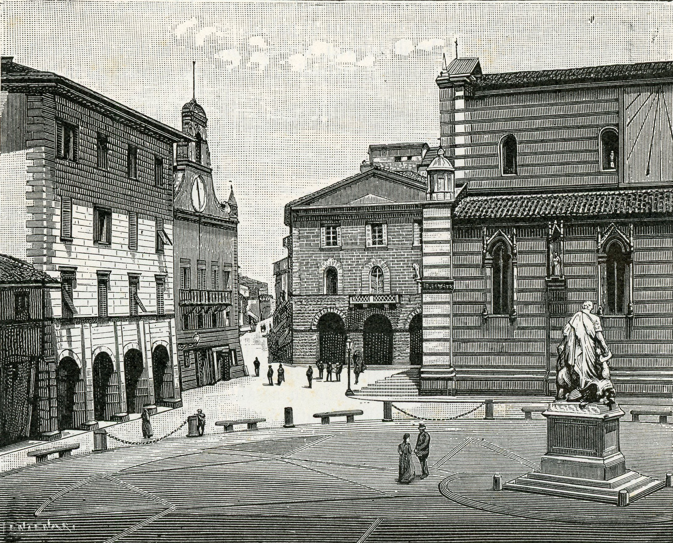 Grosseto: Piazza Vittorio II (xilografia di Ambrogio Centenari).